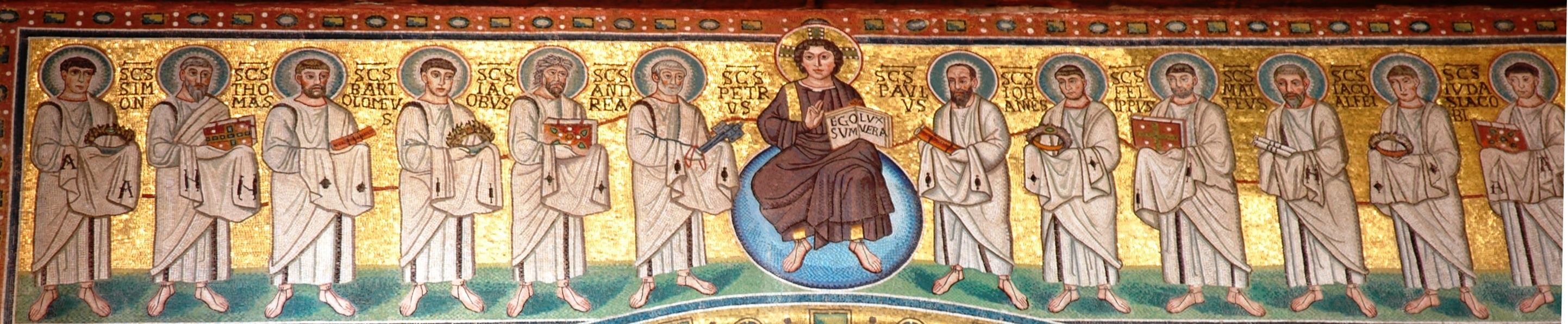 Poreč - Basílica Eufrasiana - Detall mosaics